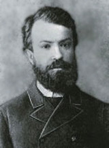 Vladimir Germanovic Bogoraz (1865-1936)